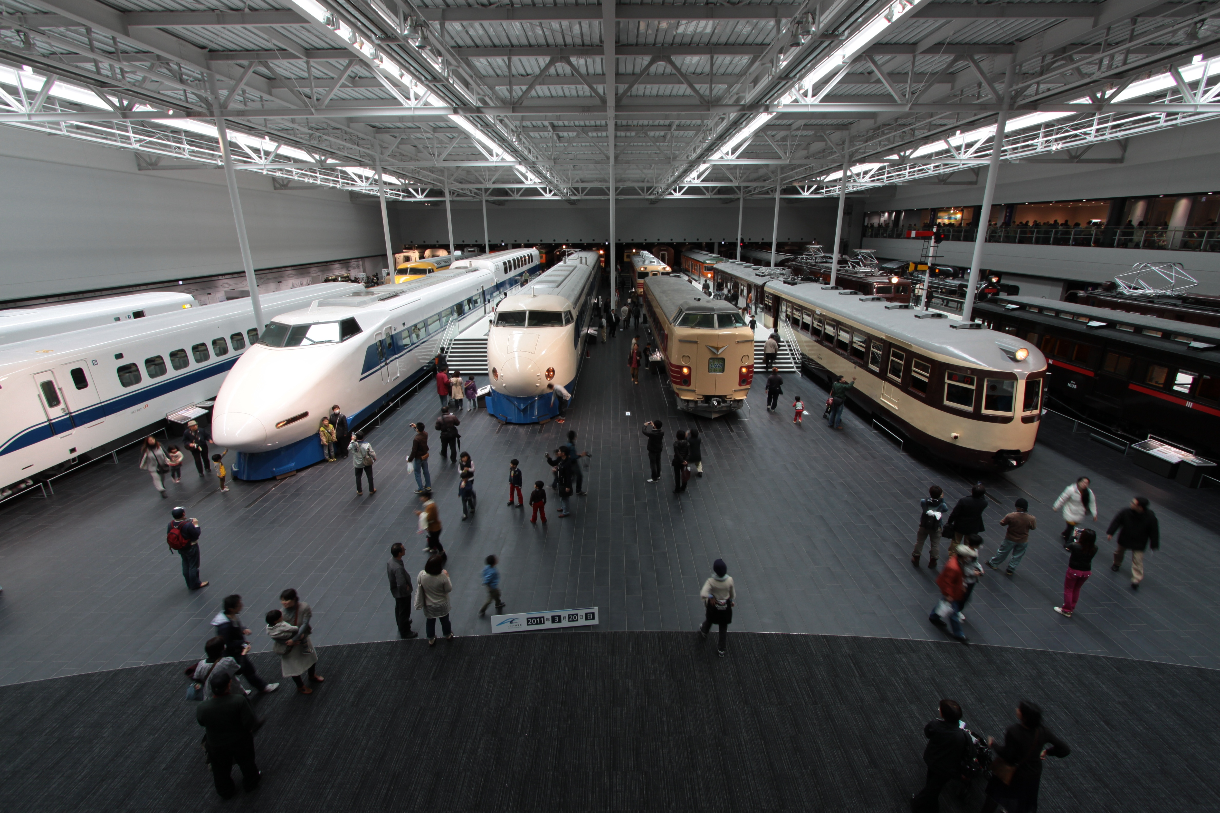 リニア・鉄道館 (愛知県名古屋市港区金城ふ頭)